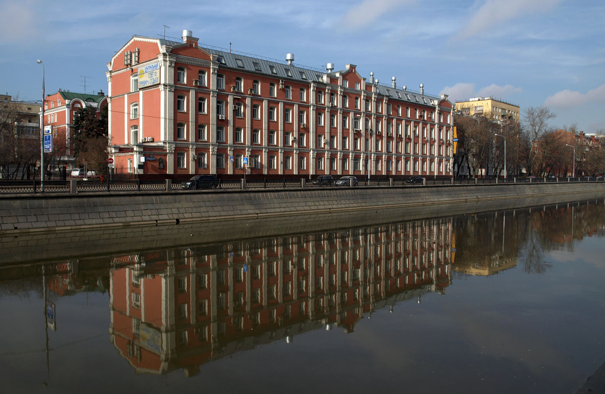 Ozerkovskaya Embankment, Moscow